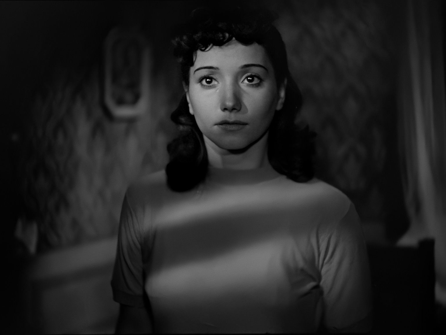 Screenshot del film Ossessione (1943) di Luchino Visconti.